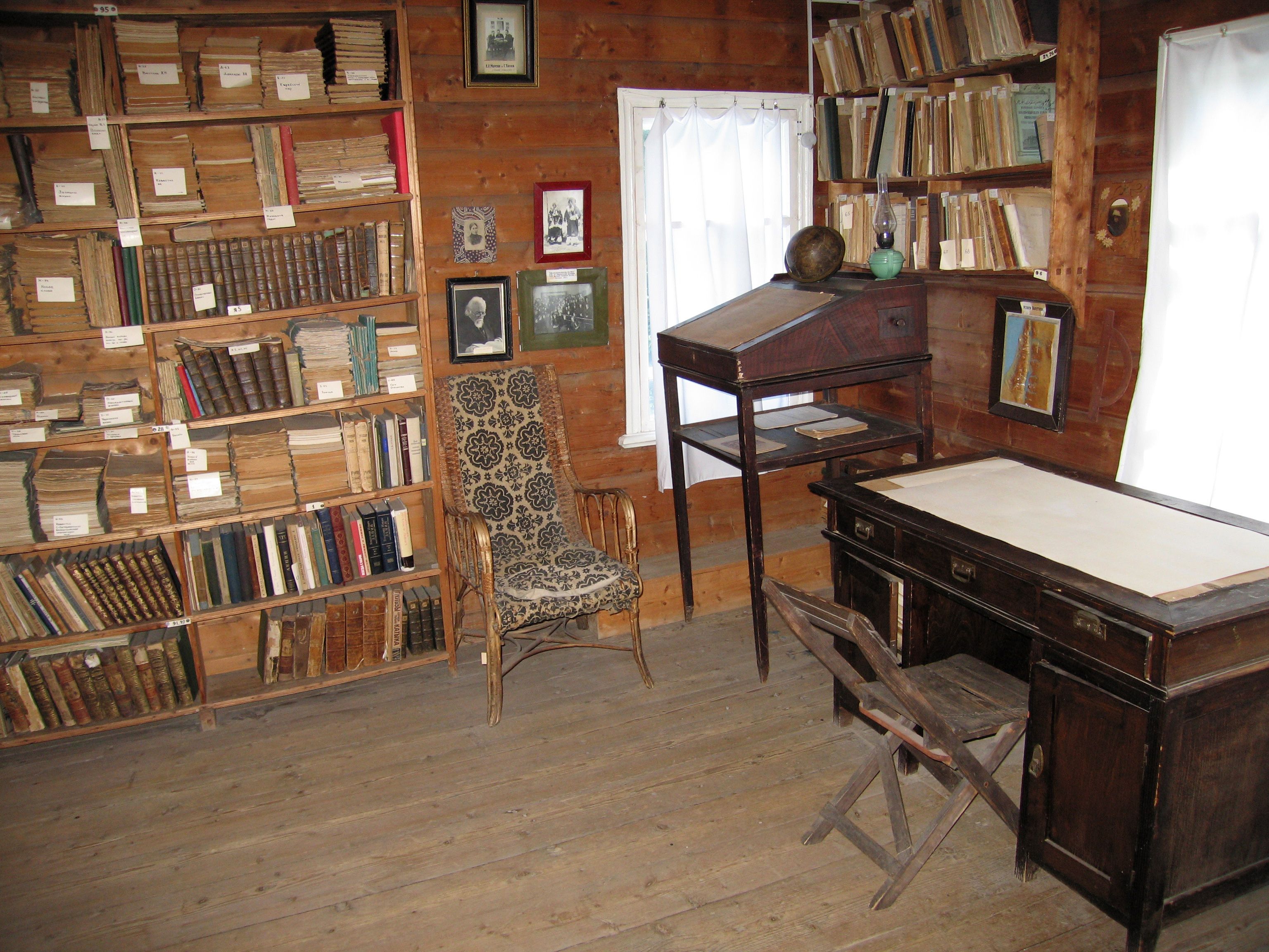 Das Arbeitszimmer von Nikolai Morosow in seinem Haus in Borok, Russland